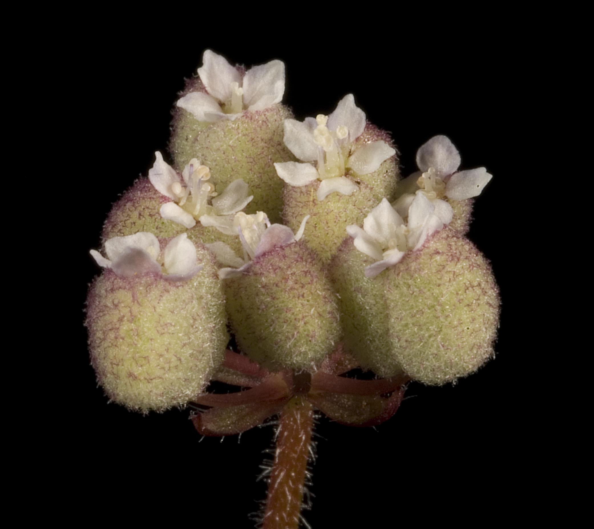 KRT3358